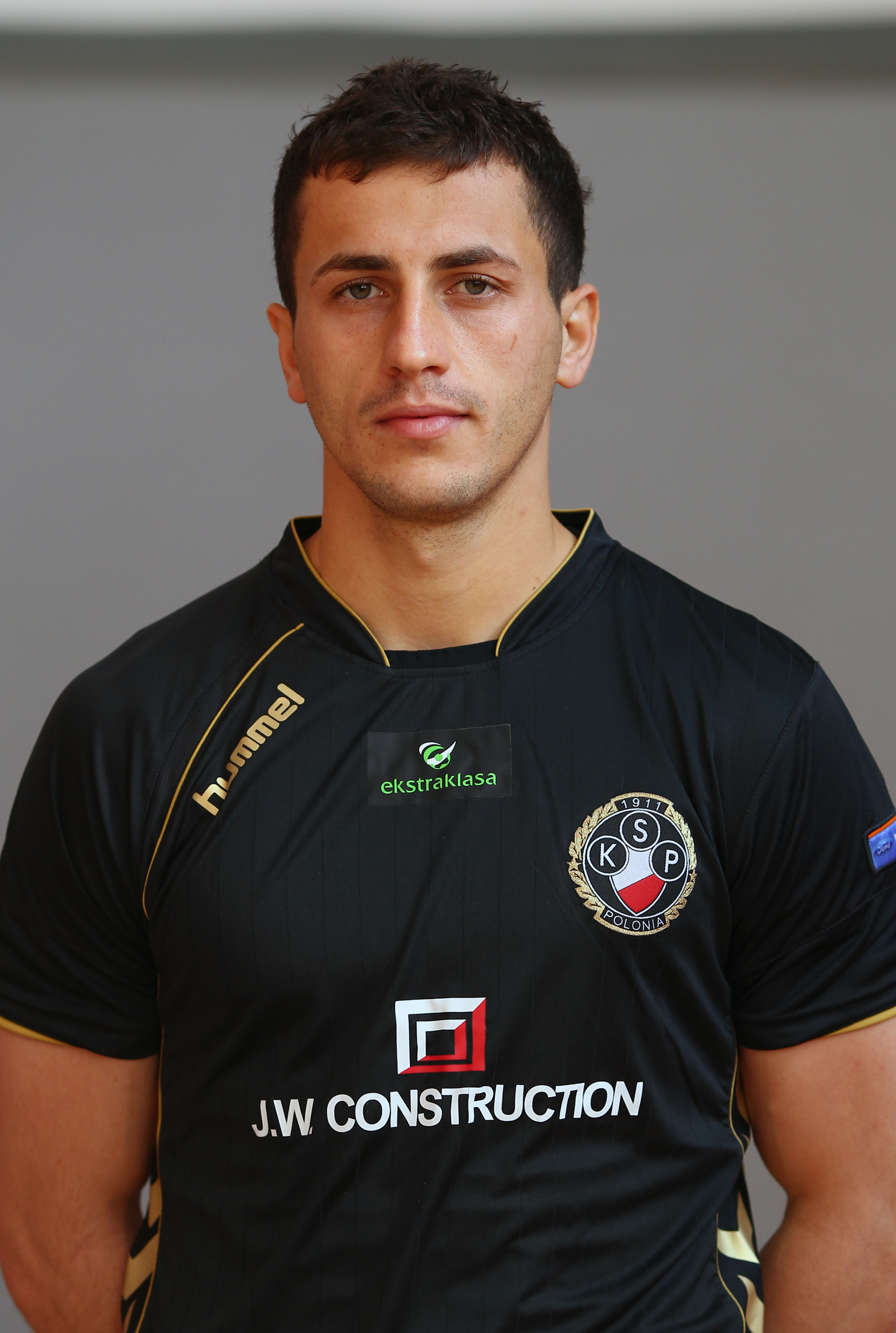 Tomasz Jodłowiec, player of Polonia Warszawa (2011)